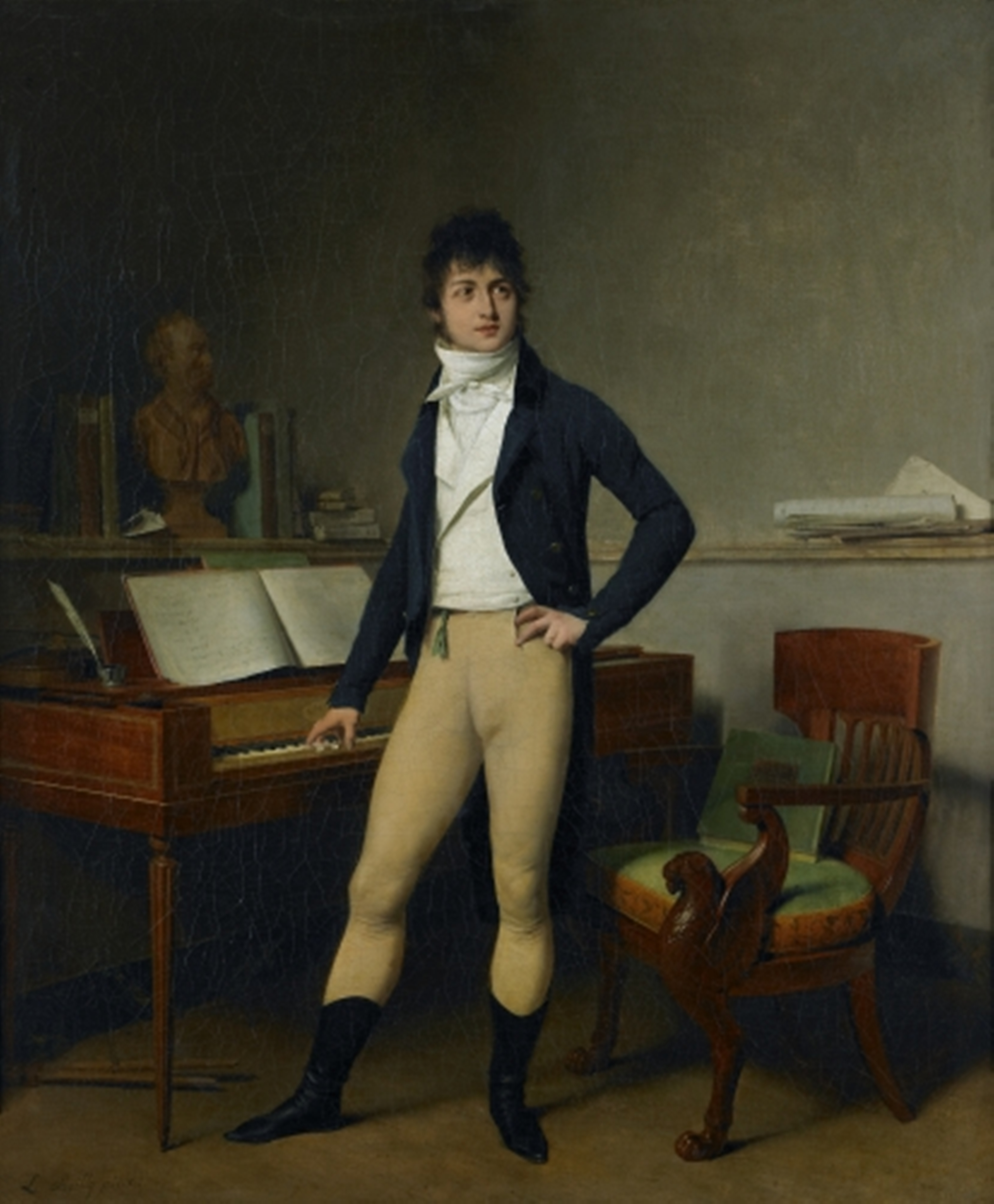 Le style, descriptif et minutieux, la sobriété de la composition est très davidienne. Ce tableau a contribué au succès du peintre Boilly